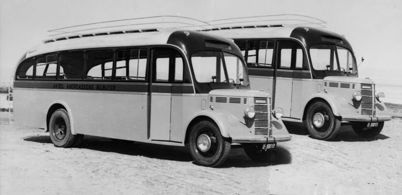 A/S Anco /v Shjetne fotogr. 2 busser for Aksel Andreassens Bilruter. Fotografert i Trondheim.